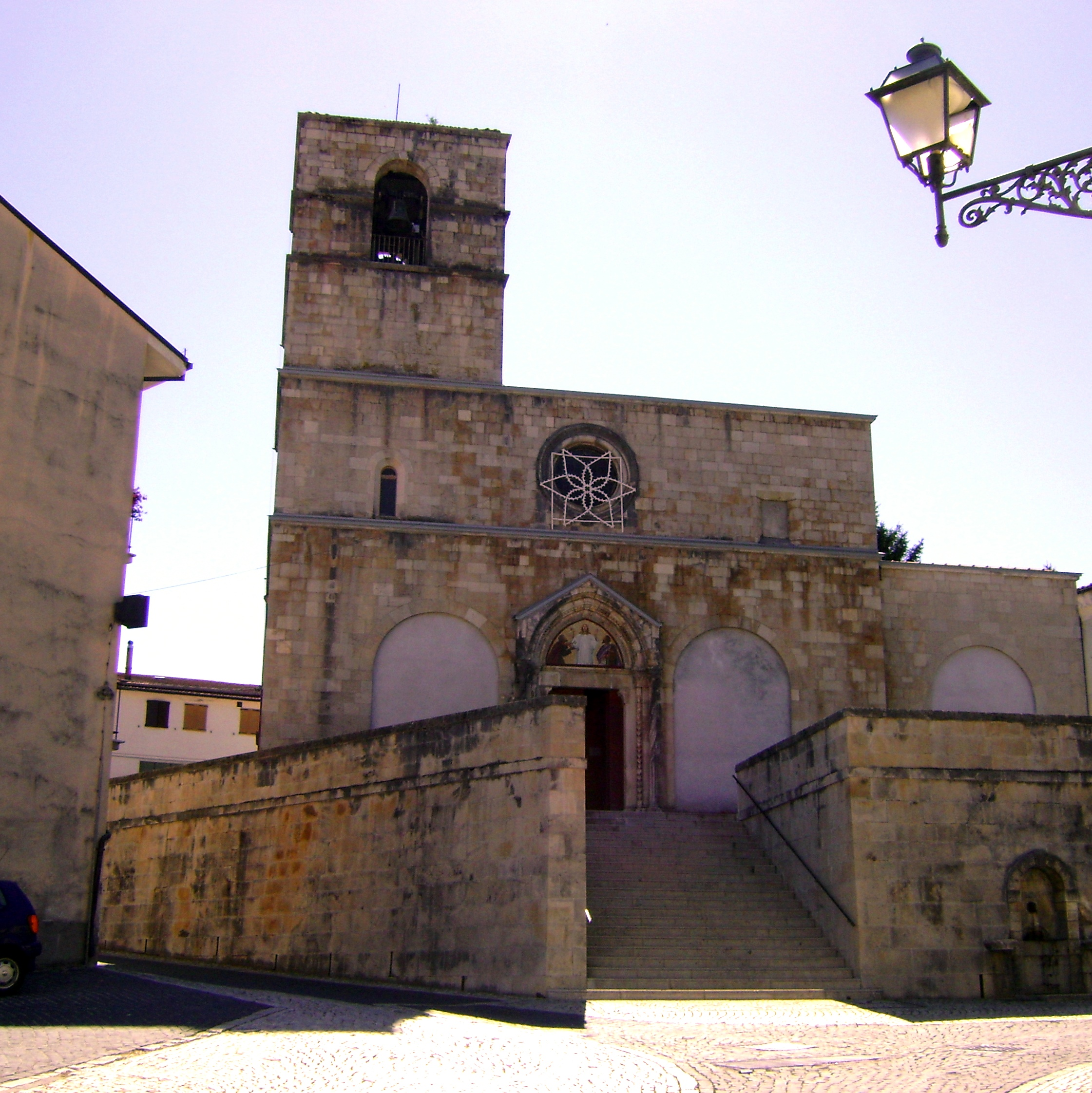 Chiesa dei Santi Pietro e Paolo. Alfedena, L'Aquila.